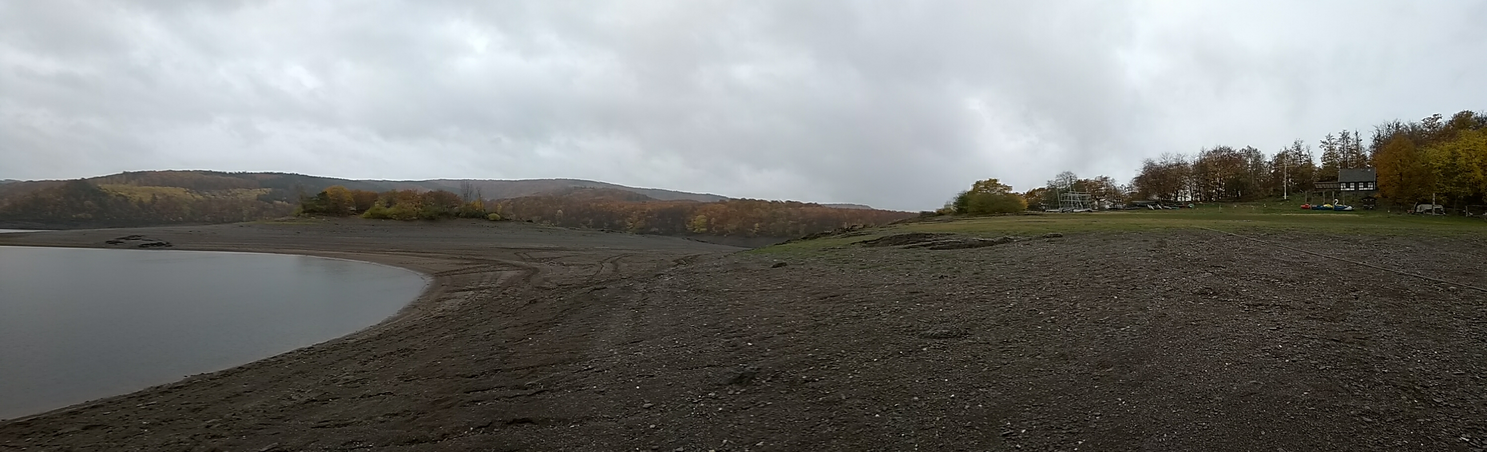 Badestrand Eschauel mit Blick in südliche Richtung bei extremen Niedrigwasser im Herbst 2018.